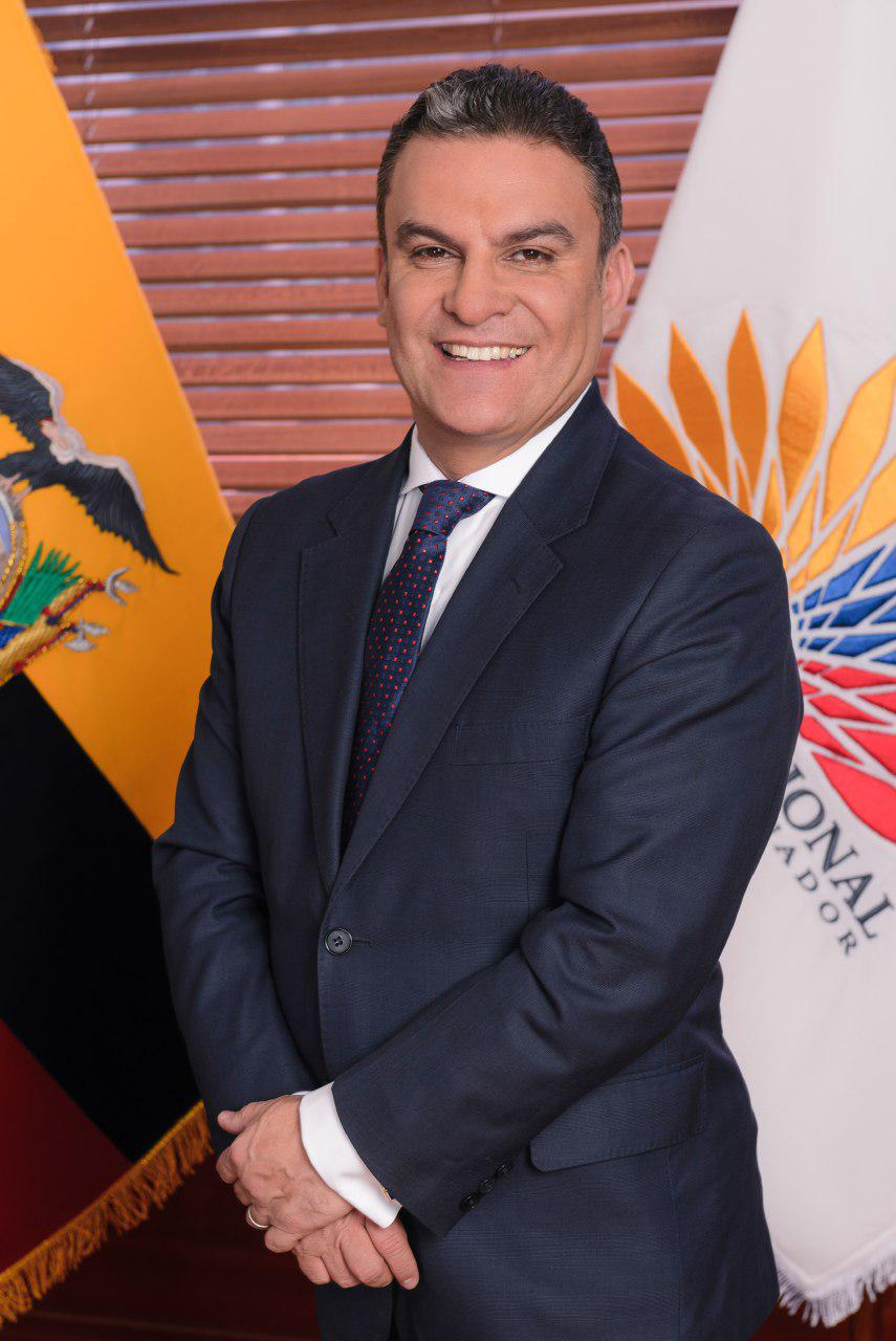 Foto Oficial del Dr. José Serrano Salgado Presidente de la Asamblea Nacional durante el periodo 2017-2019.